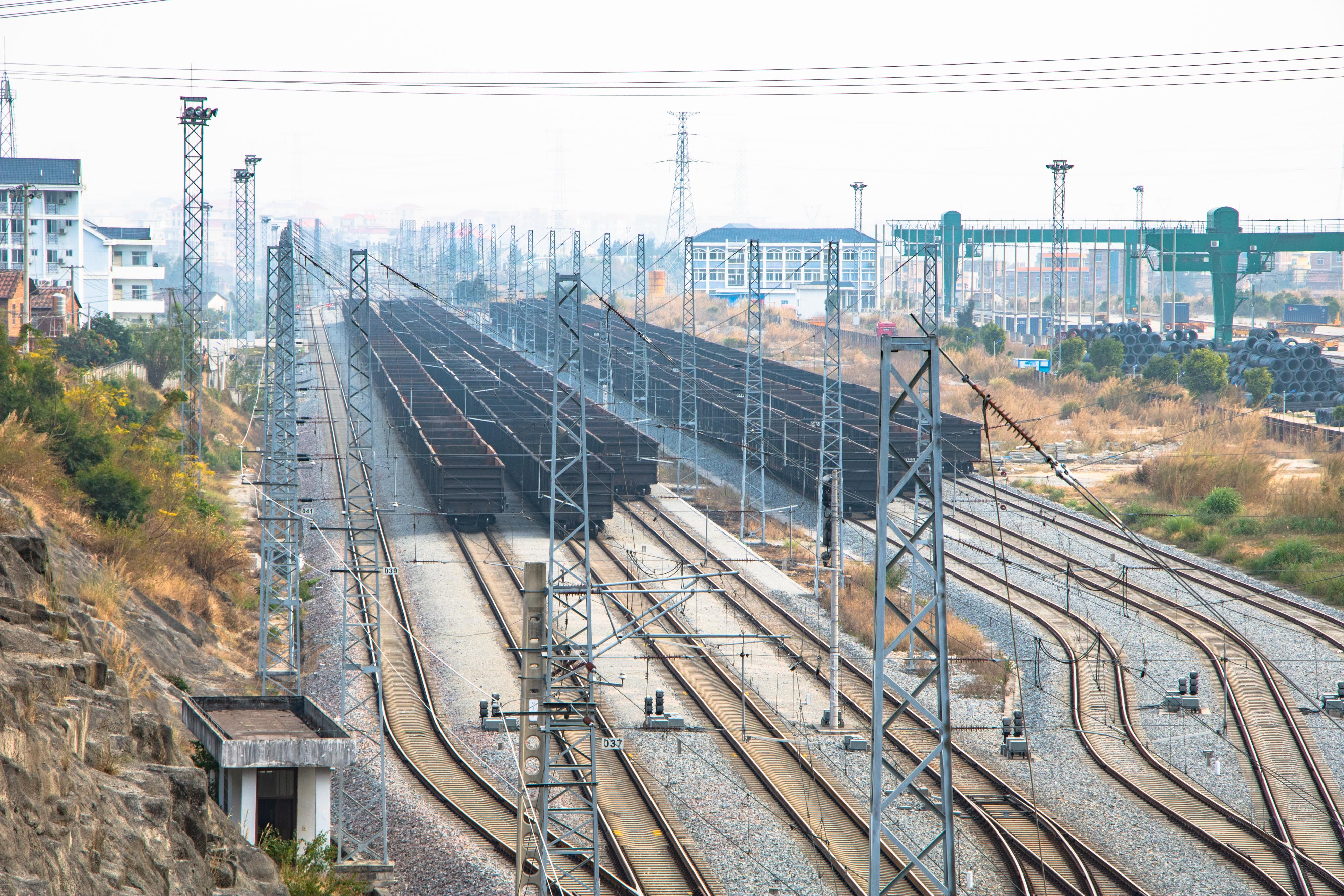 中文（中国大陆）: 莆田东站总览